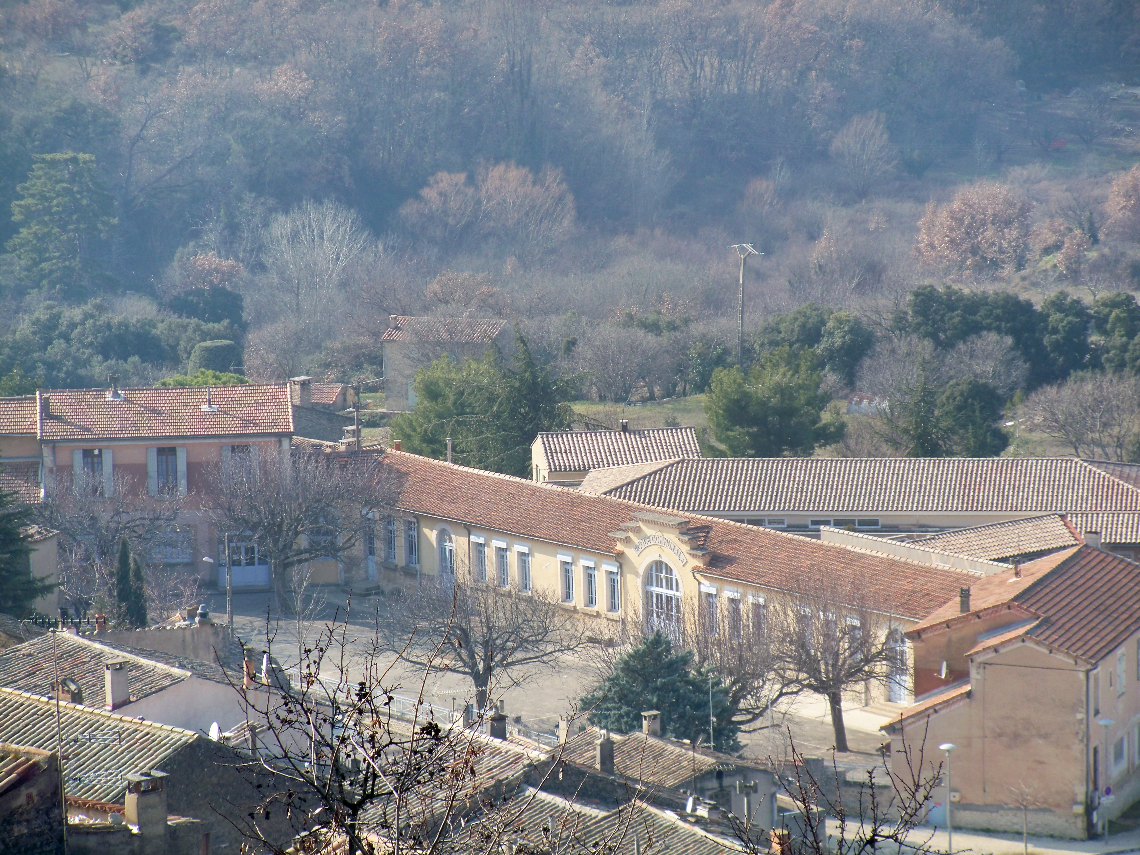 école primaire de Bonnieux, Vaucluse, France